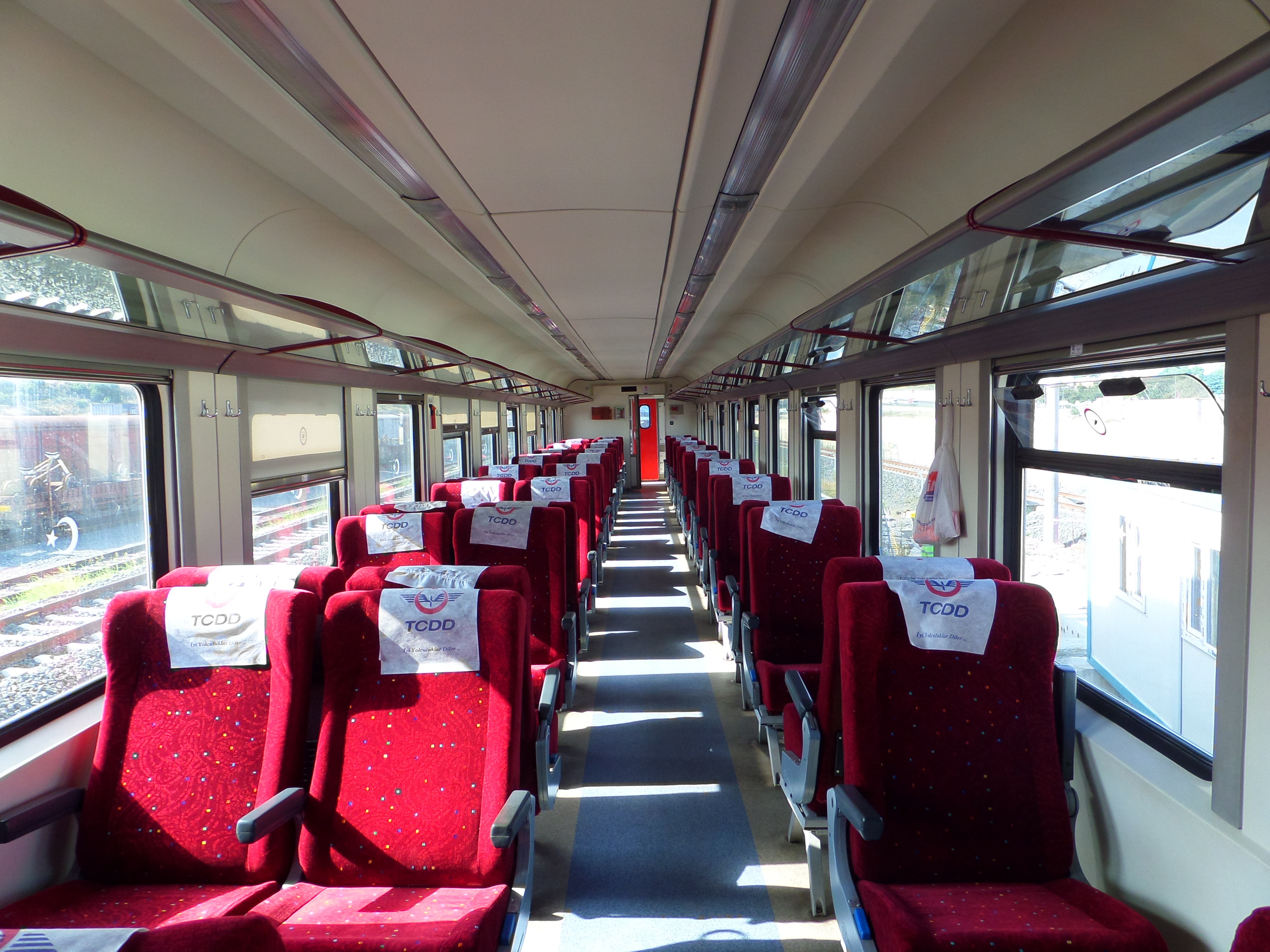 Trakya Bölgesel Ekspres